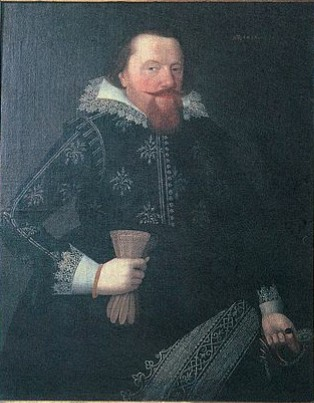 Karl Günther von Schwarzburg-Rudolstadt. Die Fotografie wurde im Dezember 2012 erstellt.